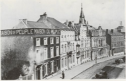 Ancienne maison du Peuple de Soignies, rue de la Station